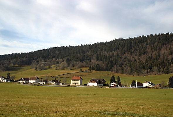 Strassenzeilendorf La Sagne